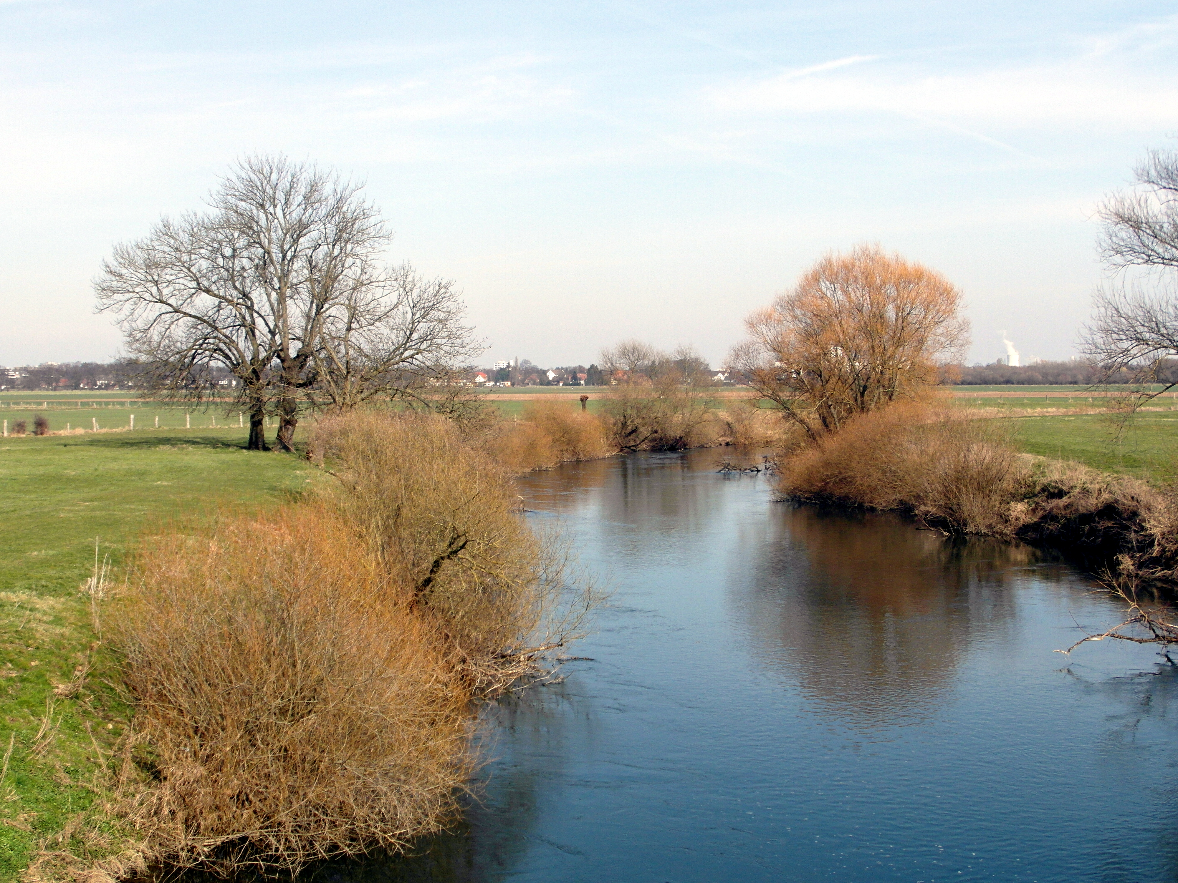 Die Leine bei Lohnde im Landschaftsschutzgebiet LSG-H 00027 Mittlere Leine